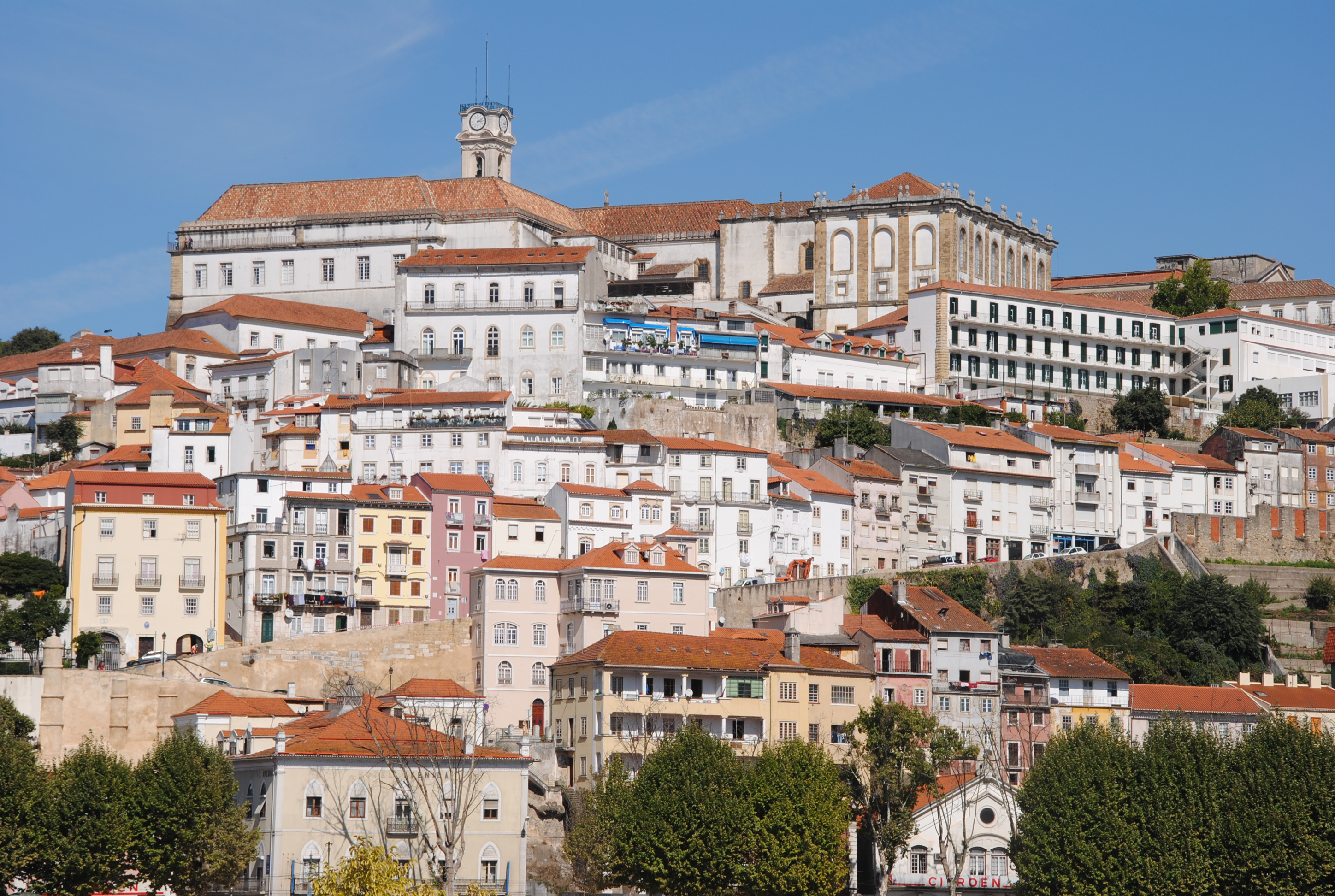 Coimbra, Portugal